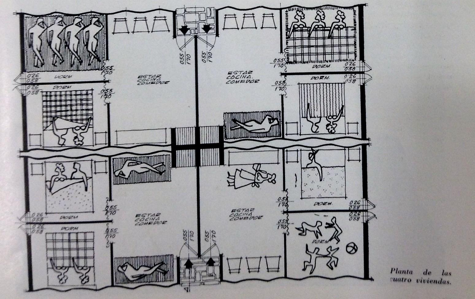 Interior de las viviendas túnel del proyecto ctesifonte